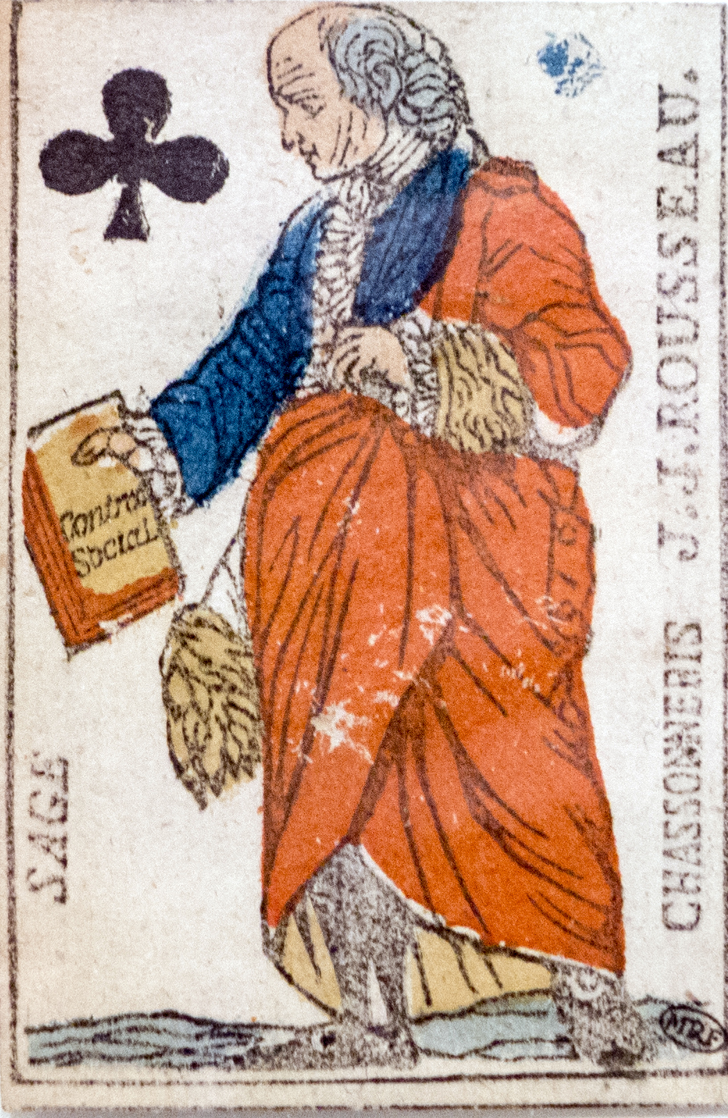 Carte à jouer